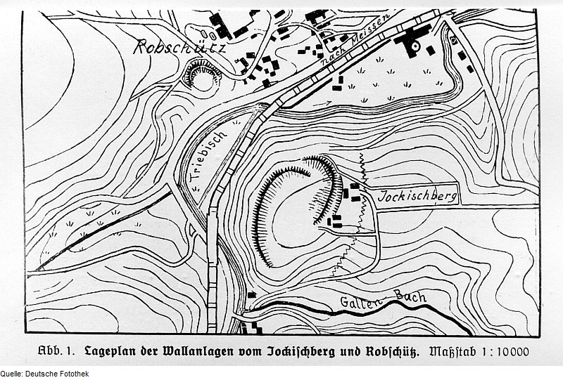 Original image description from the Deutsche Fotothek Triebischtal-Robschütz. Eulitzmühle und Mühlgraben am oberen rechten Rand des Lageplanes der Wallanlagen vom Jockischberg, aus: Mitteilungen des Sächs. Heimatschutzes, Bd. 18, S. 209